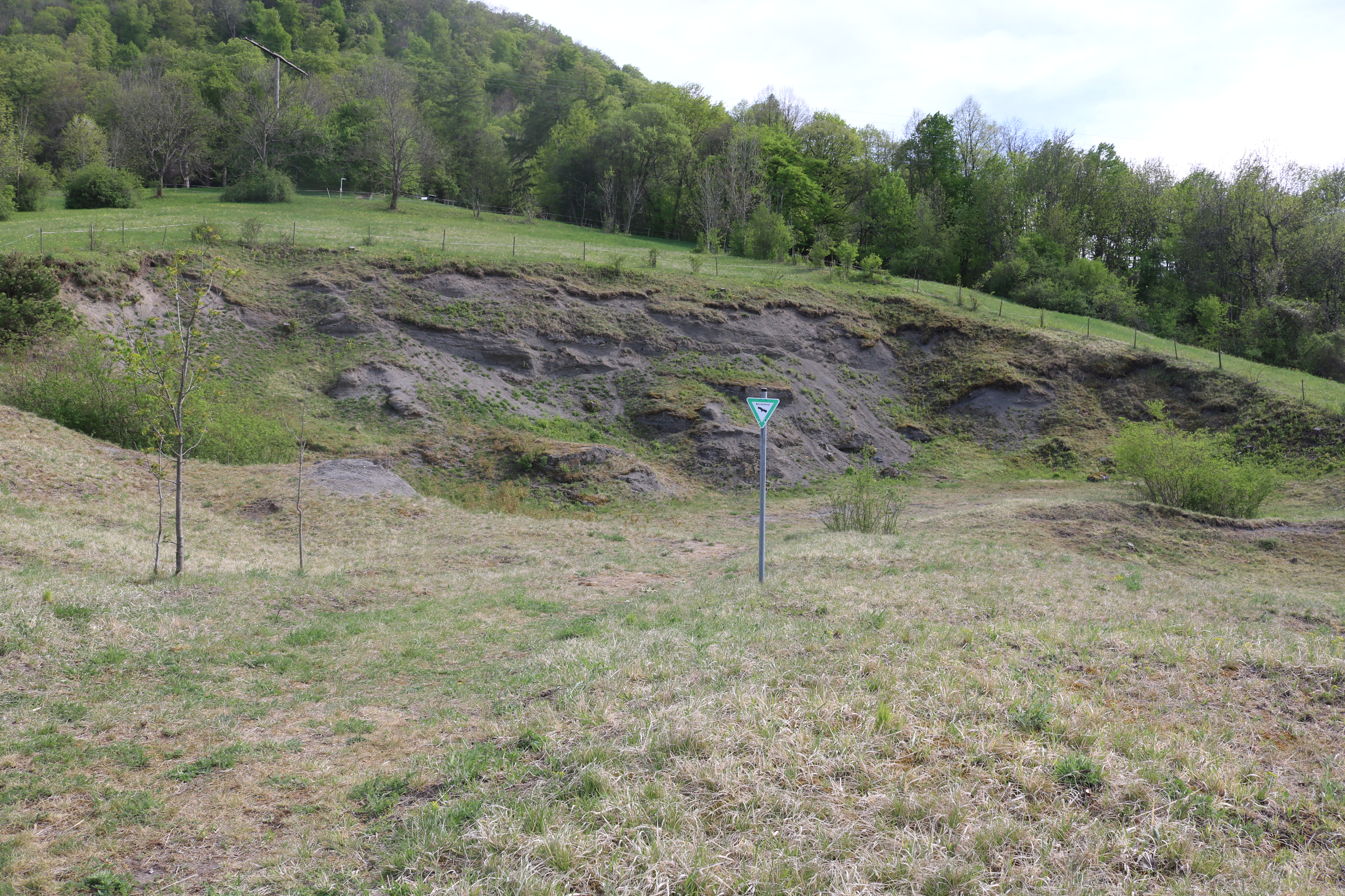 Naturdenkmal Sandgrube Beuren nach einer im Jahr 2019 durchgeführten Pflegemaßnahme